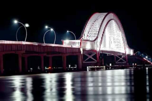 Indahnya Jembatan Tayan Saat Malam